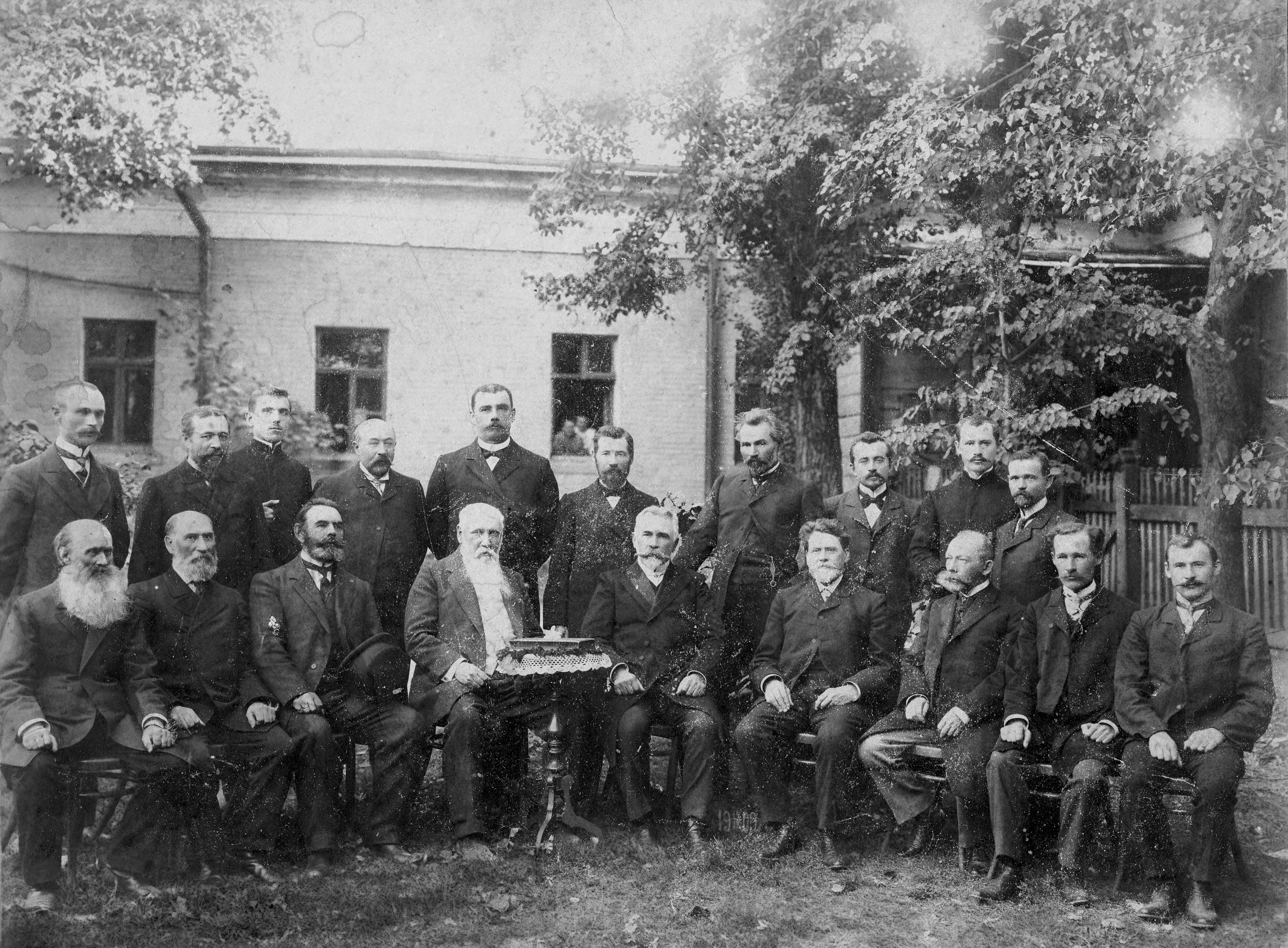 Конторщики князя Барятинского. Село Ивановское 24 сентября 1909 года.